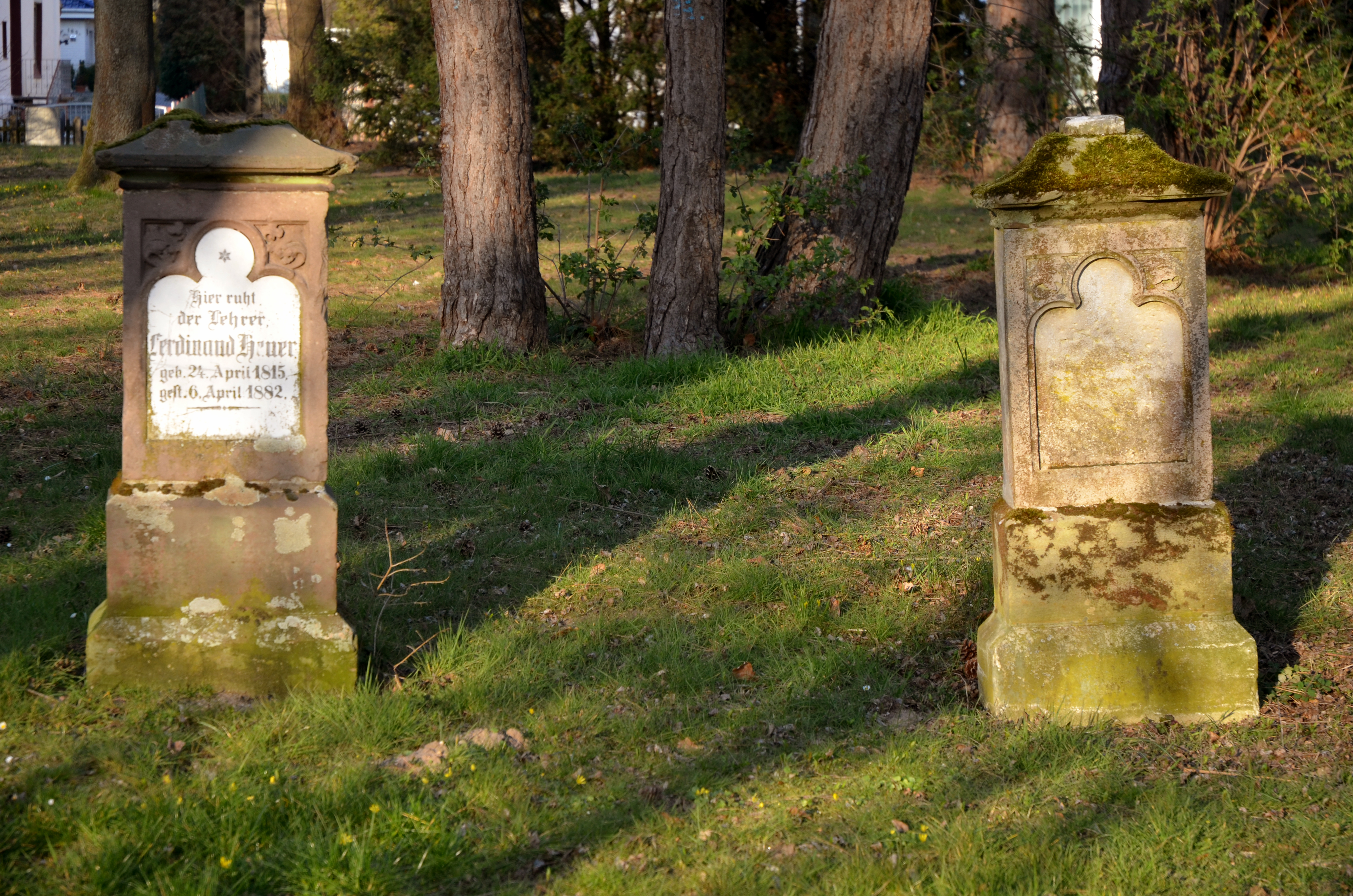 Grabmal für den Lehrer, Küster, Organisten und Verfasser mehrerer Rechenbücher Ferdinand Heuer auf auf dem aufgelassenen - und denkmalgeschützten - Alten Friedhof Grasdorf ...